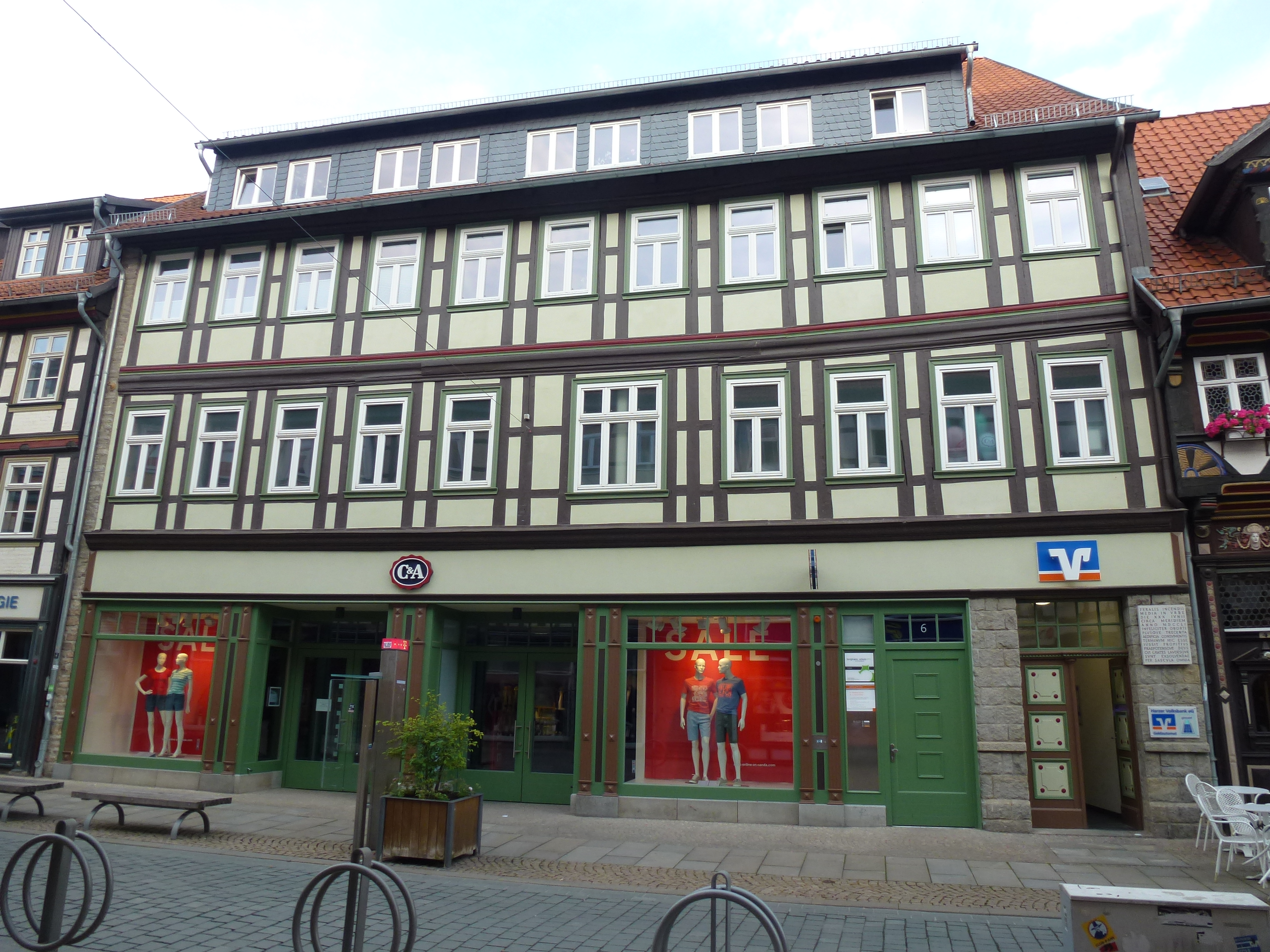 Das Haus Breite Straße 6 in Wernigerode wurde um 1550 erbaut. Seit Sanierung 2011 befindet sich ein Ladengeschäft dort, zuvor wurde es viele Jahre als Sitz der Volksbank genutzt.